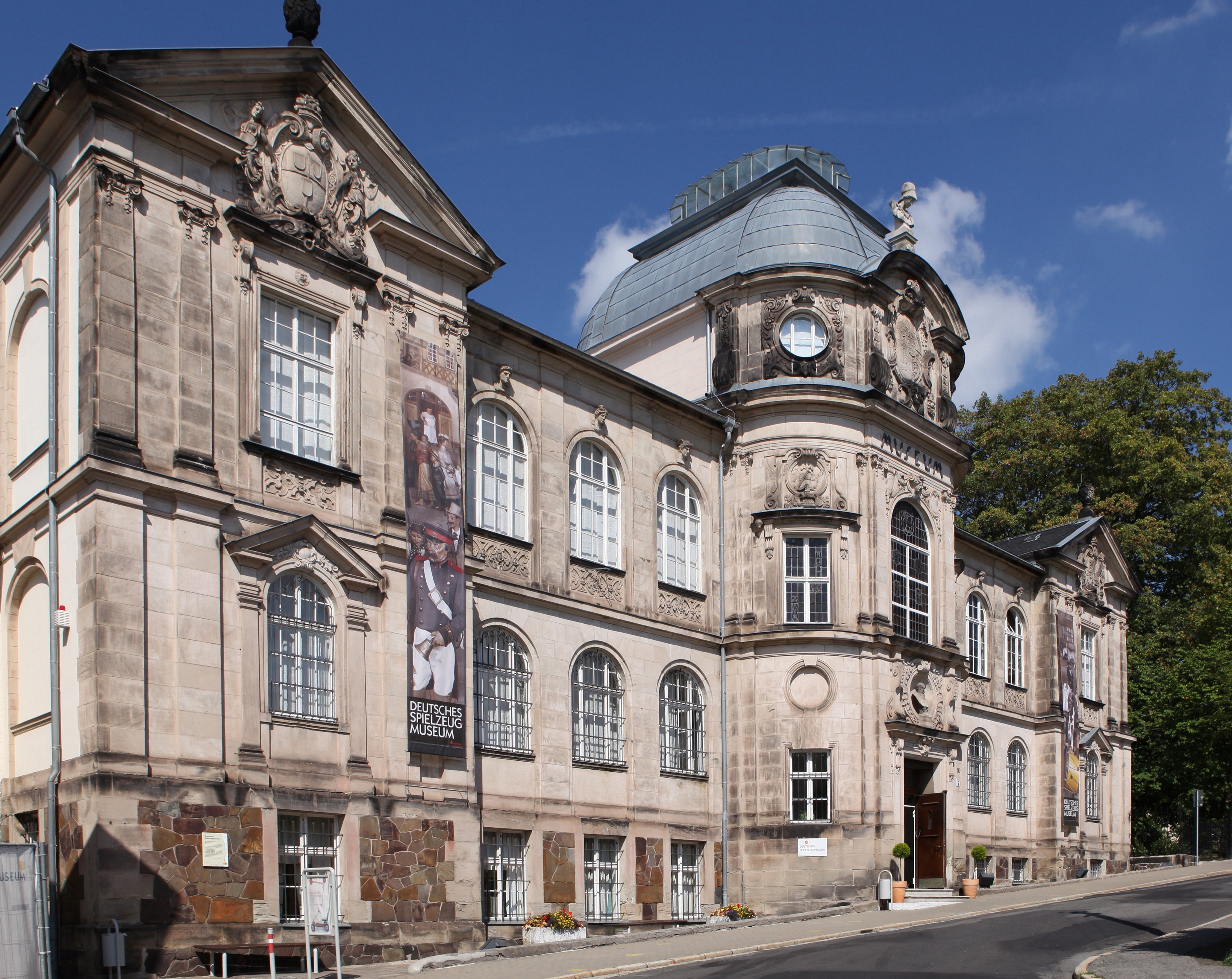 Deutsches Spielzeugmuseum, neubarocker Massivbau mit Walmdach, 1899-1901, von Albert Schmidt, Sonneberg, Beethovenstraße 10